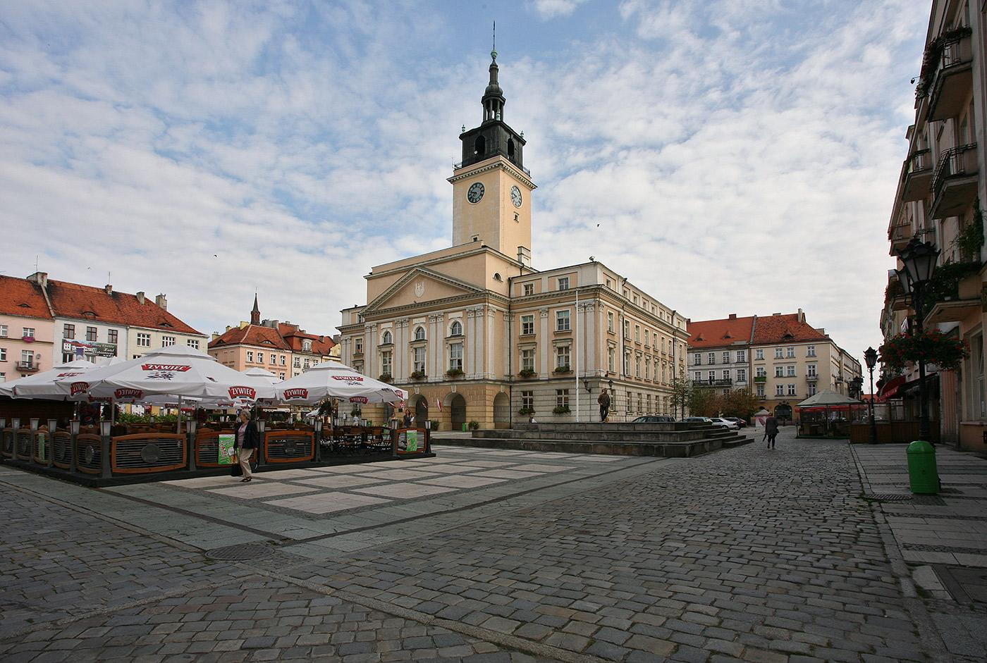 Kaliski ratusz w kontekście zabudowy rynku.